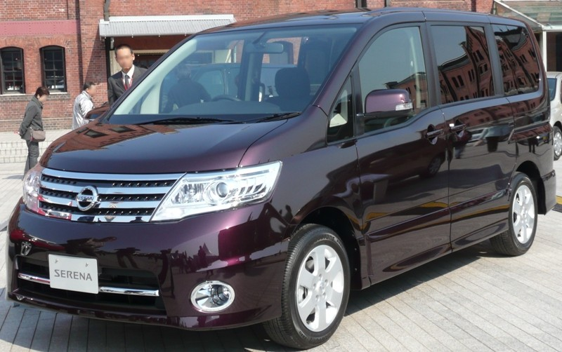 Nissan Serena.